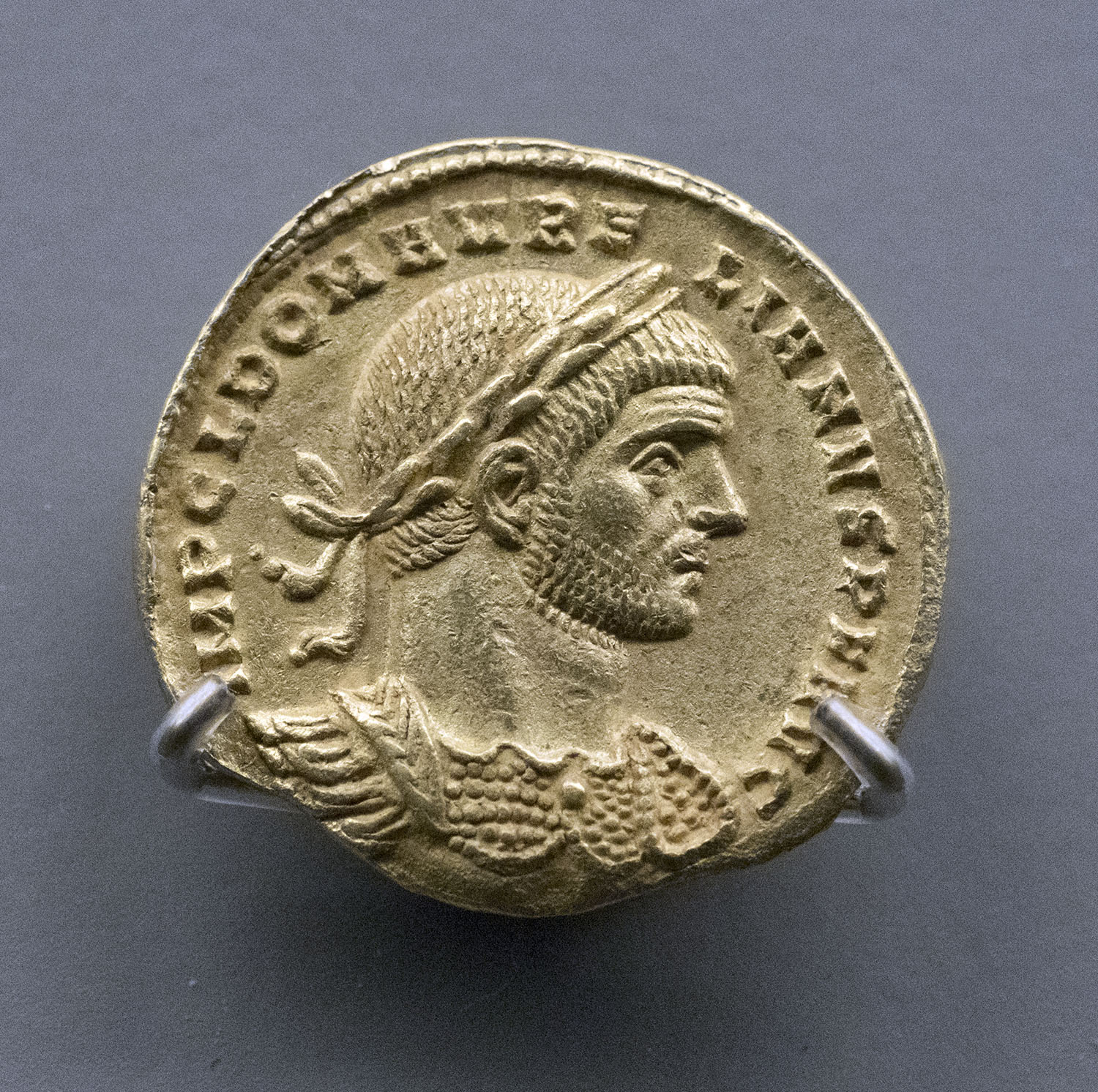 Moneda romana de oro de 20 mm de diámetro con la representación de Aureliano. Años 270-275.